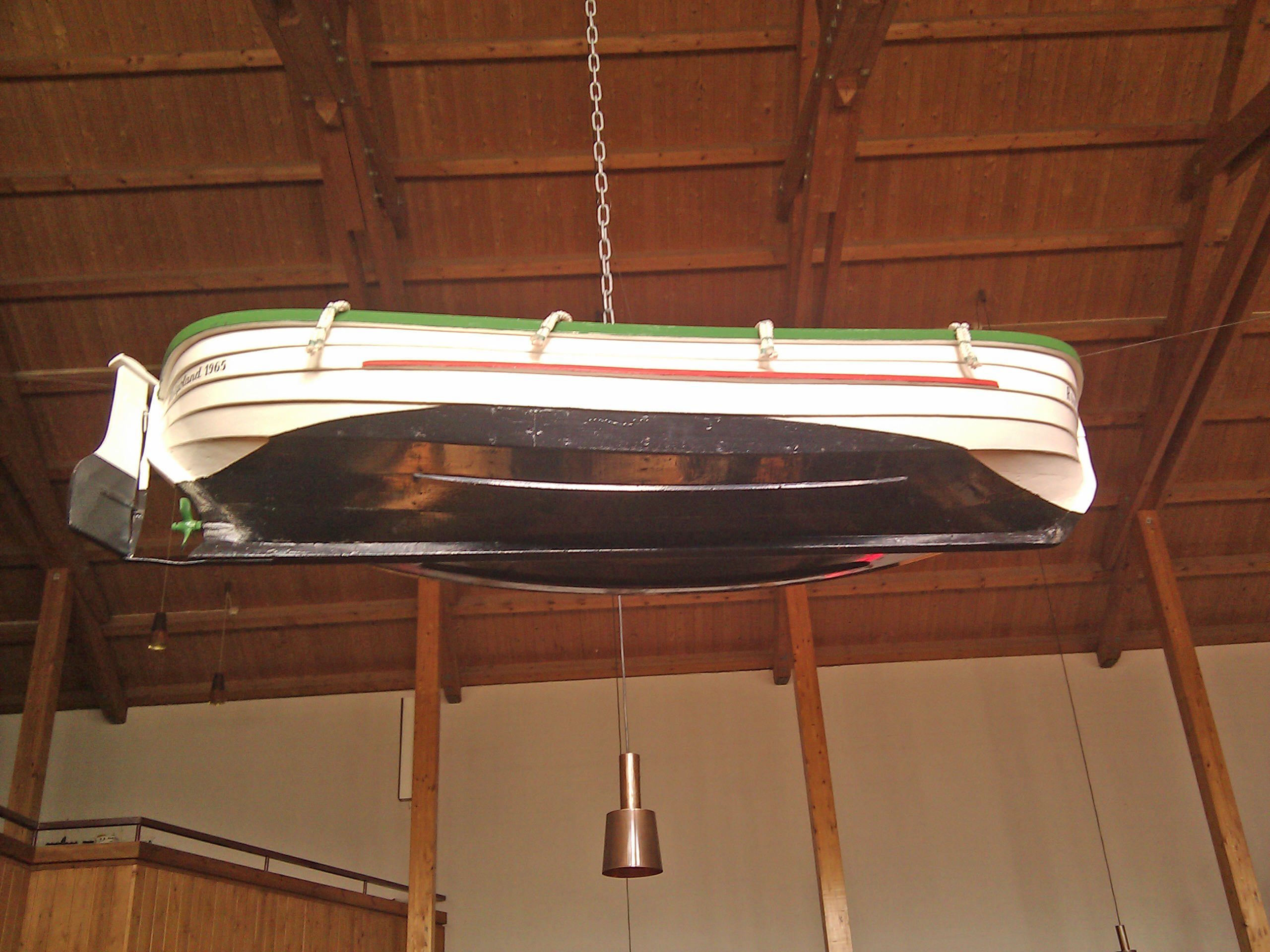 Modell eines historischen Börtebootes in der Helgoländer Kirche